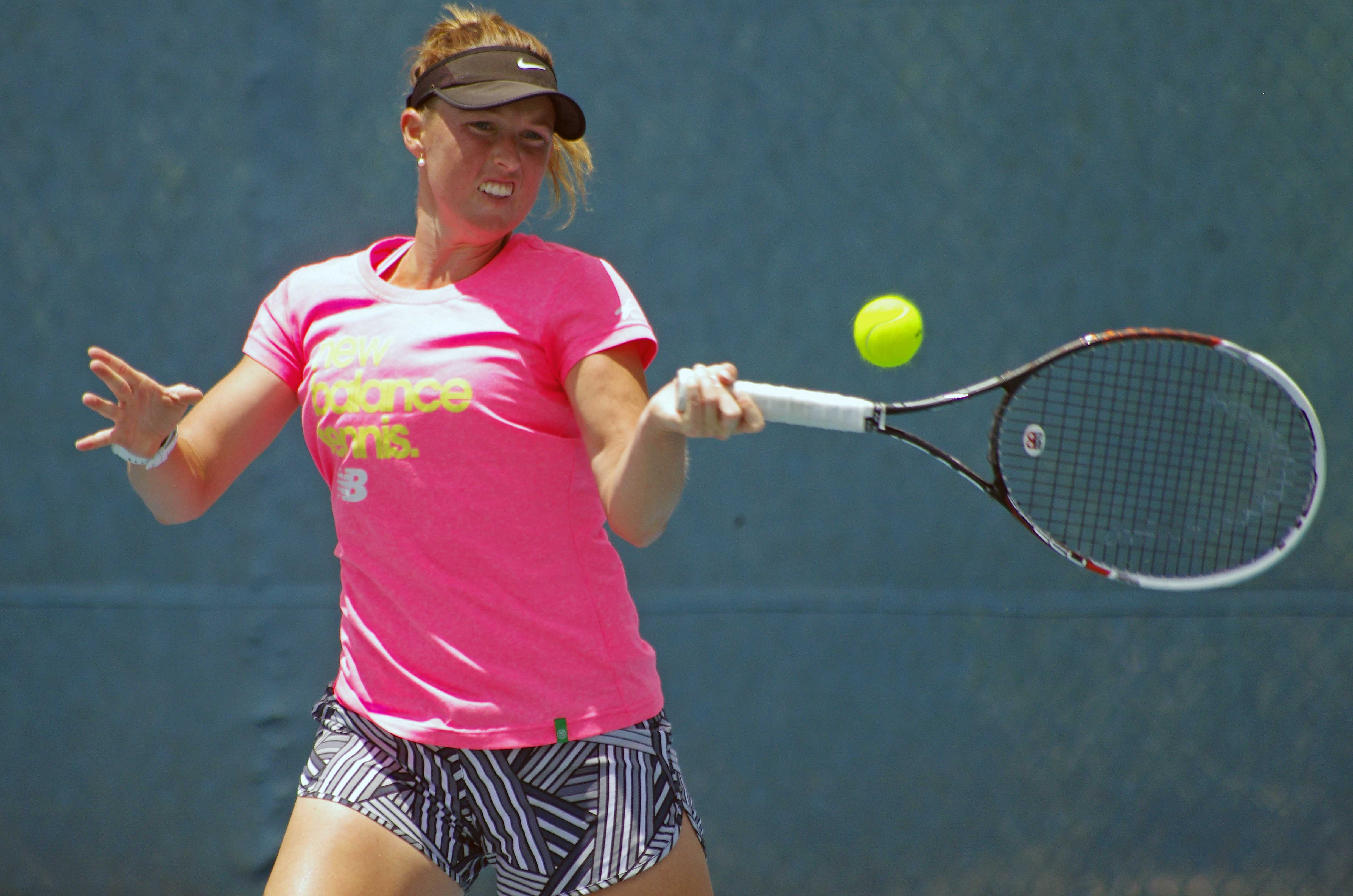 STORM SANDERS